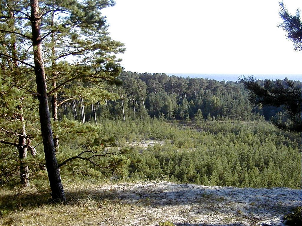 Nīcas apkārtne, skats no Pūsēnu kalna 2002-08-03